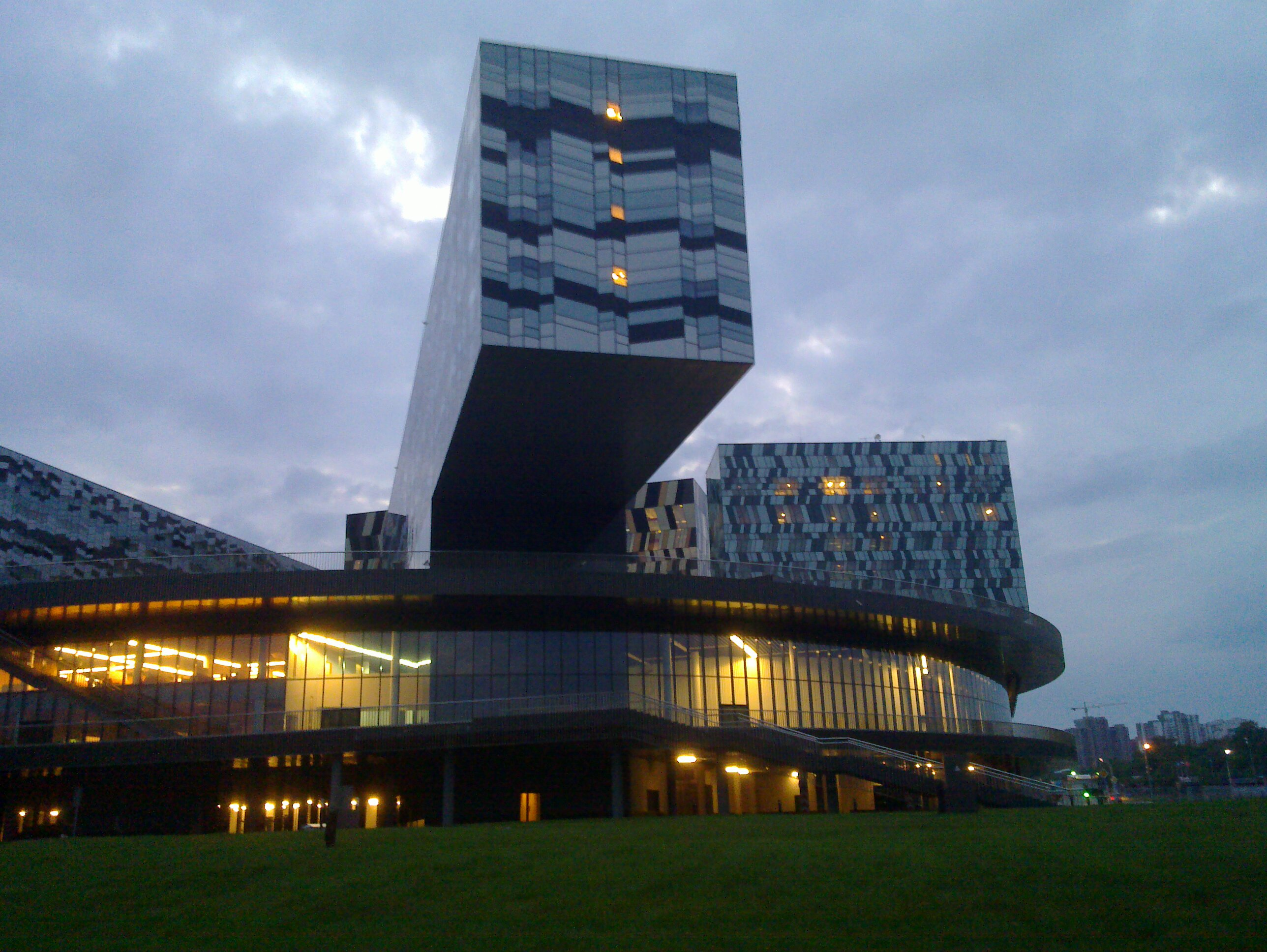 Здание инновационного хаба в деревне Сколково под Москвой, Россия. Авторы SANAA and OMA architecture bureau.